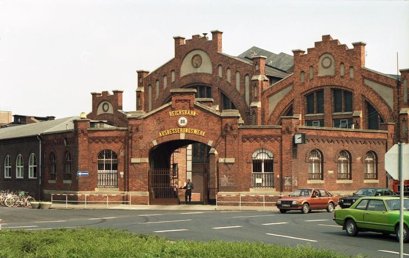 11.-18.8.1991 Bundesland Sachsen-Anhalt Stendal, Reichsbahn-Ausbesserungswerk